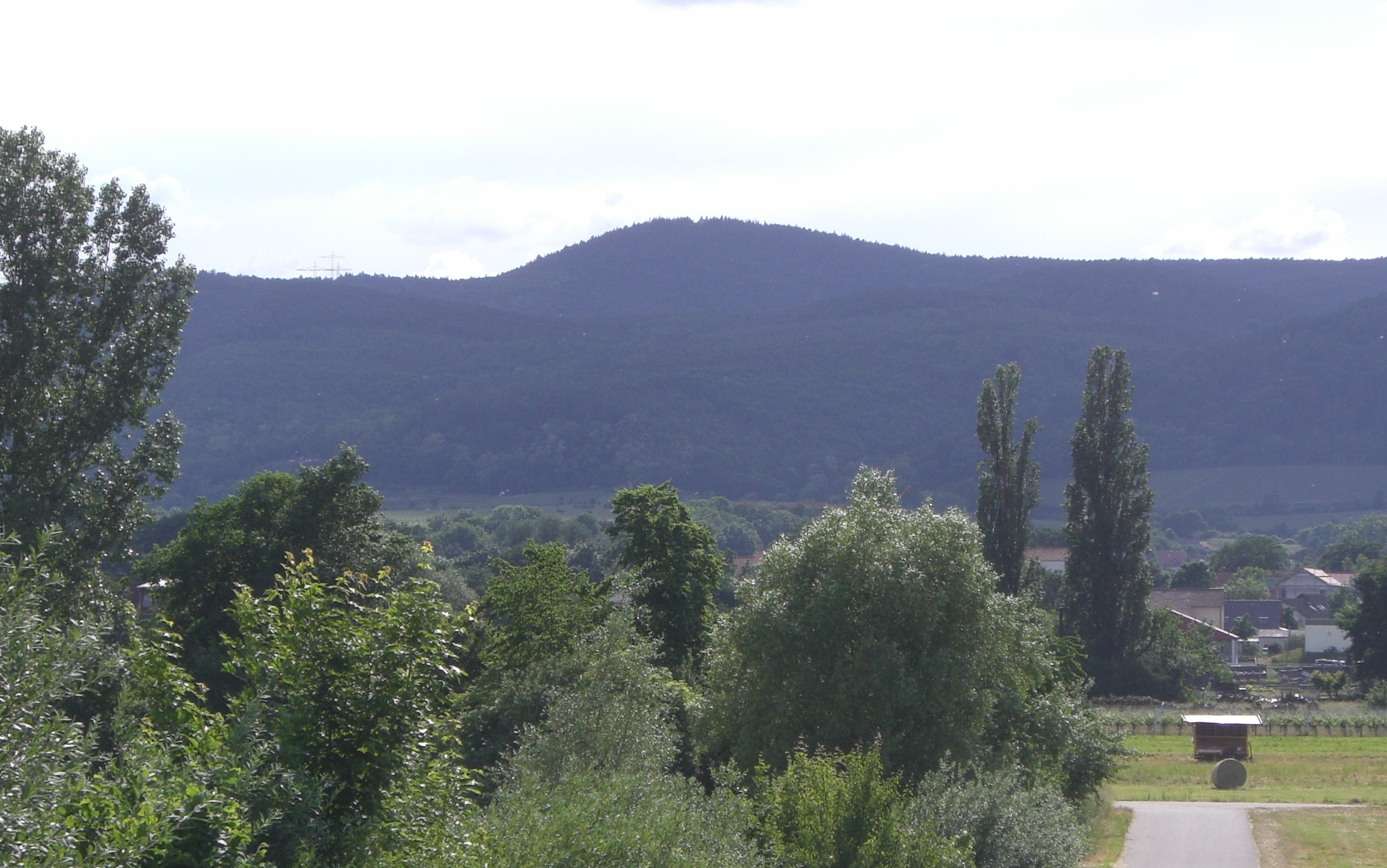 Der Stabenberg, von Deidesheim fotografiert